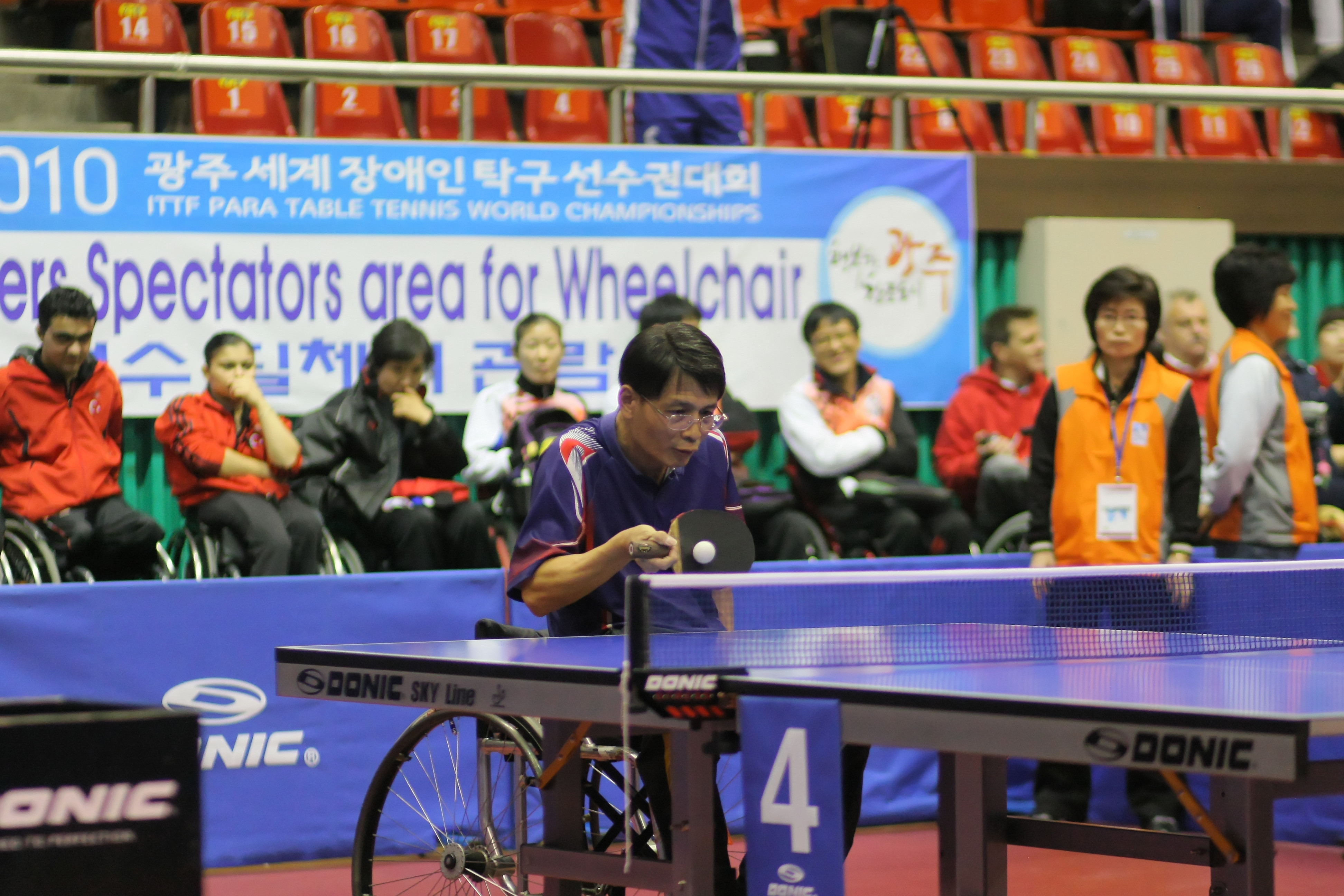 Yen Hung Lin (TPE)